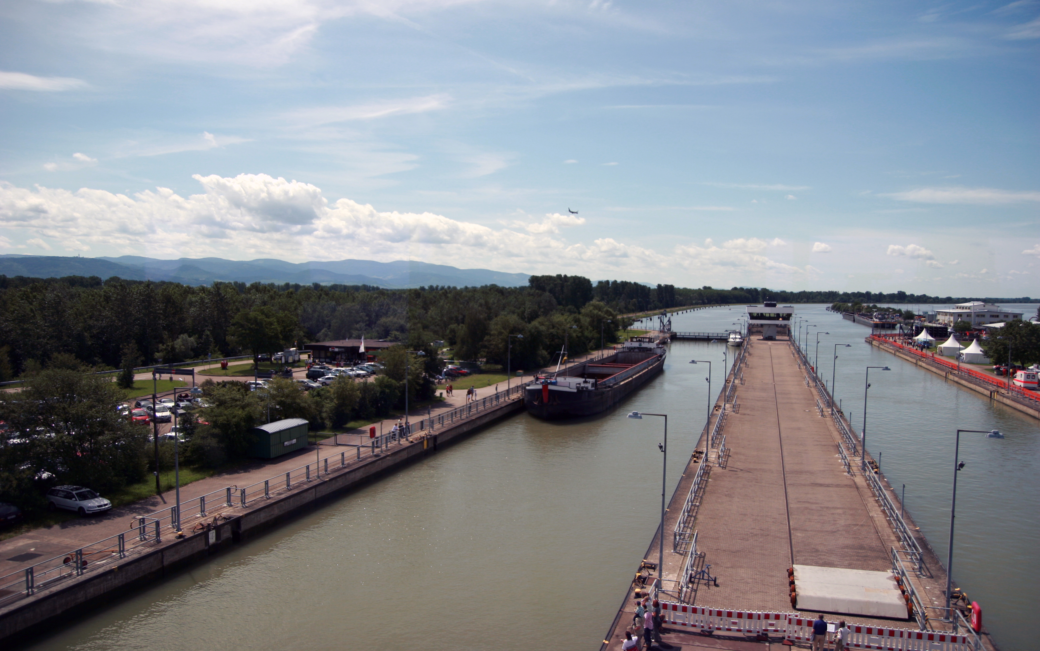 Sicht vom Kontrollturm auf die Schleuse Iffezheim.